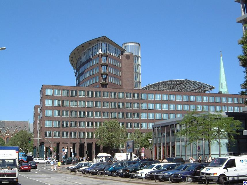 Neuer Dovenhof im Hamburger Kontorhausviertel